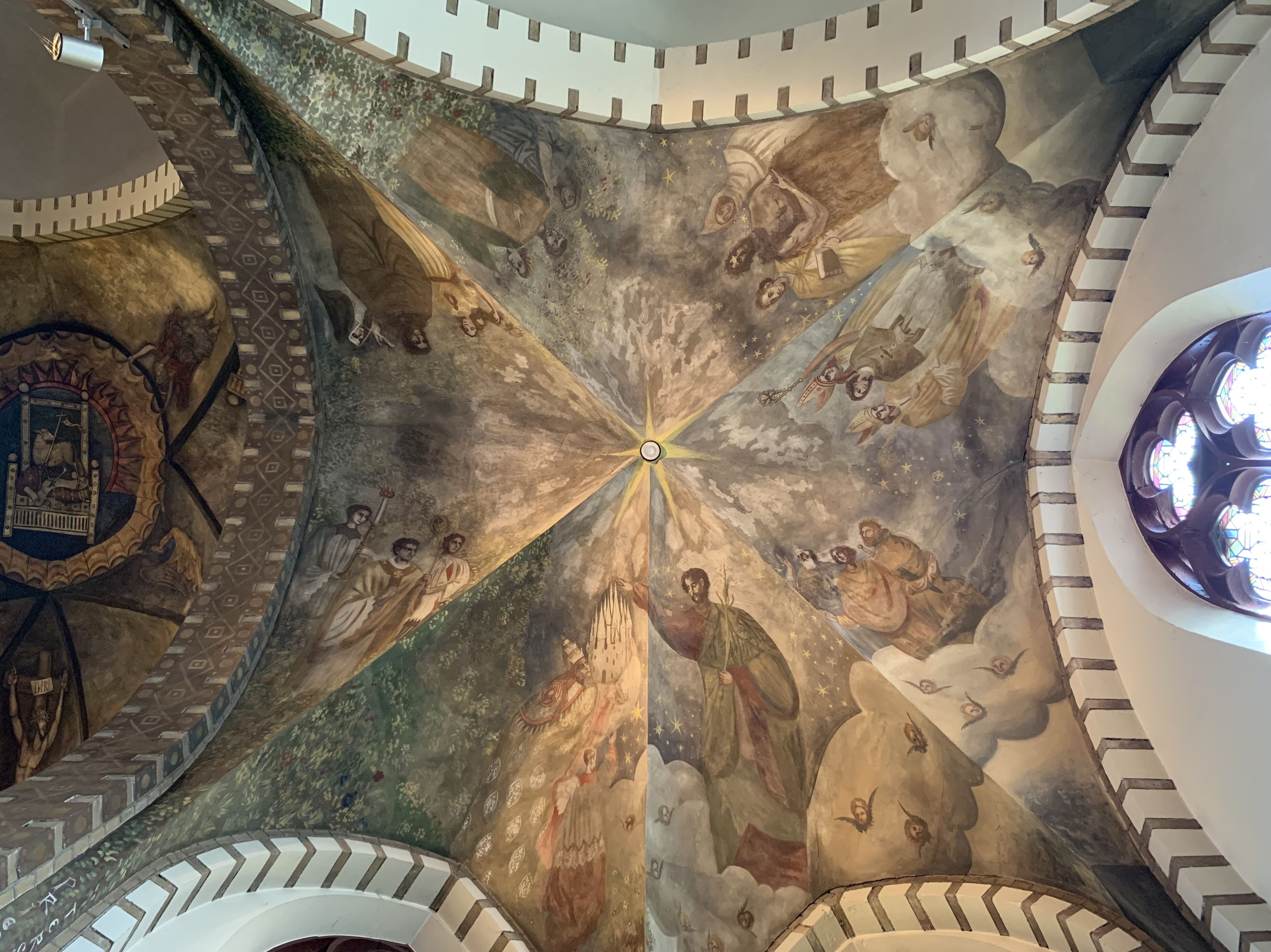 Gewelfschildering Odulphuskerk, Bakhuizen